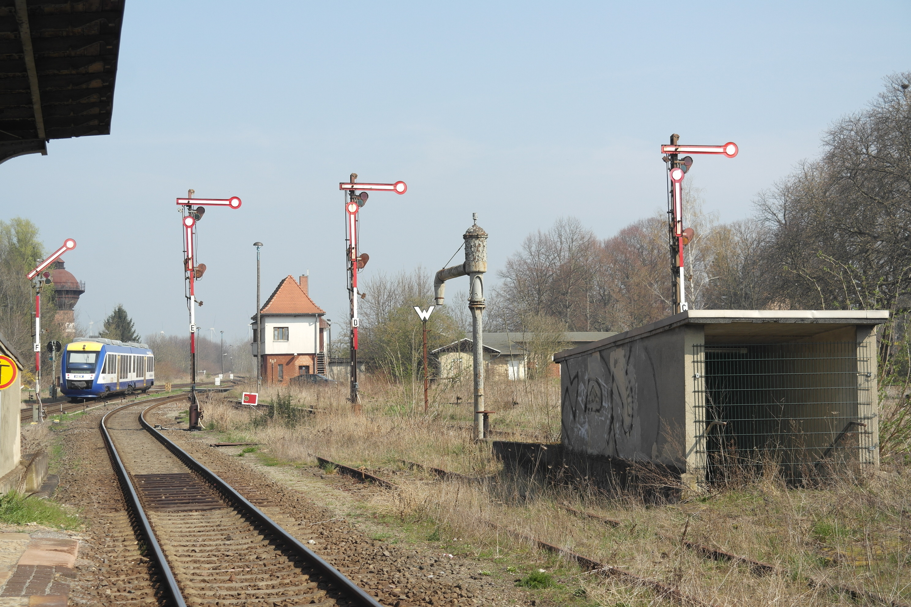 Bahnhof Blumenberg, Blick nach Osten